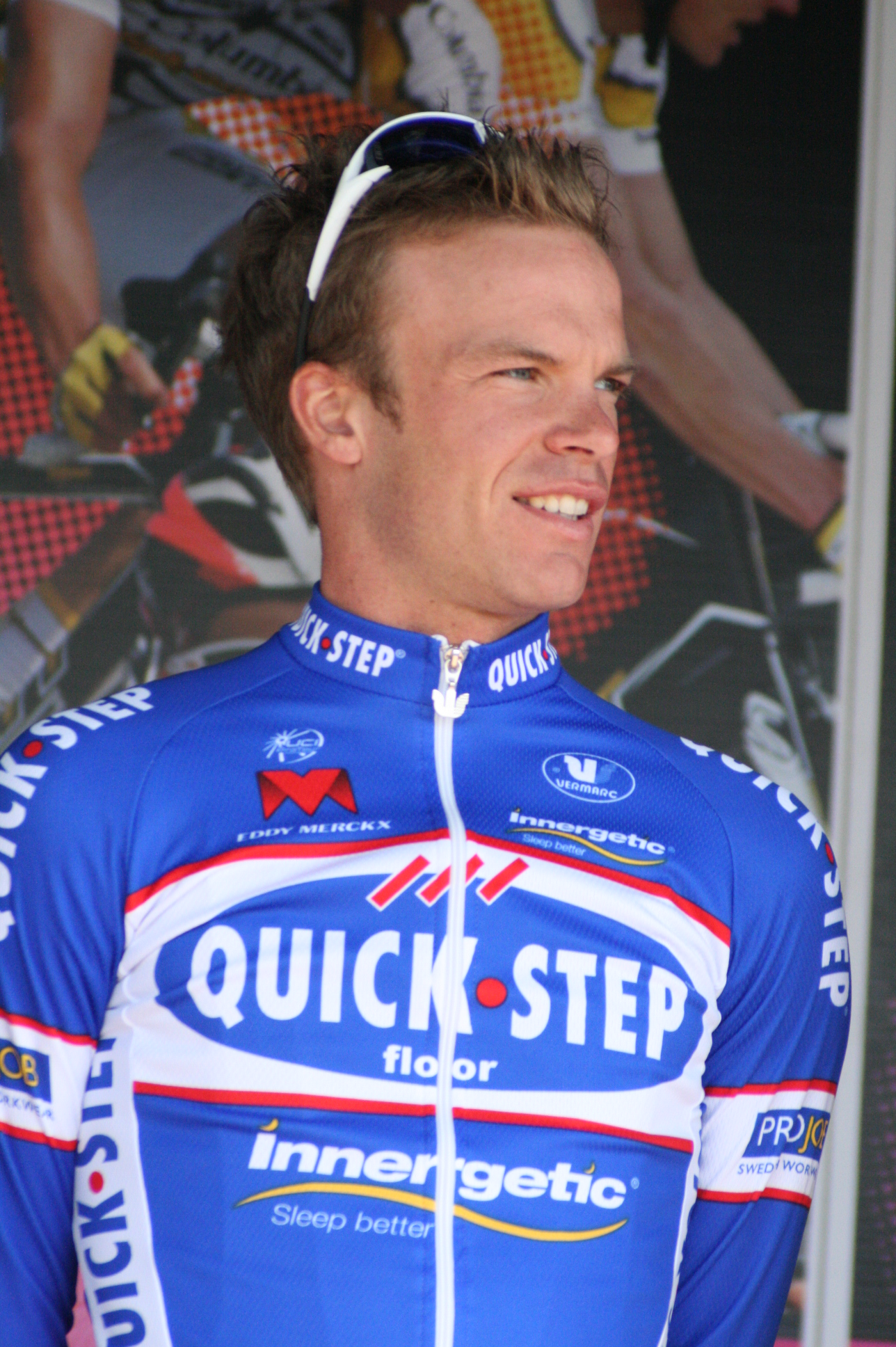 Iljo Keisse, lors de la présentation des équipes des 4 jours de Dunkerque 2010